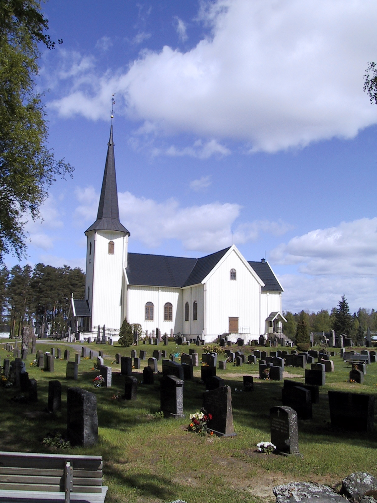 Våler kirke i Våler